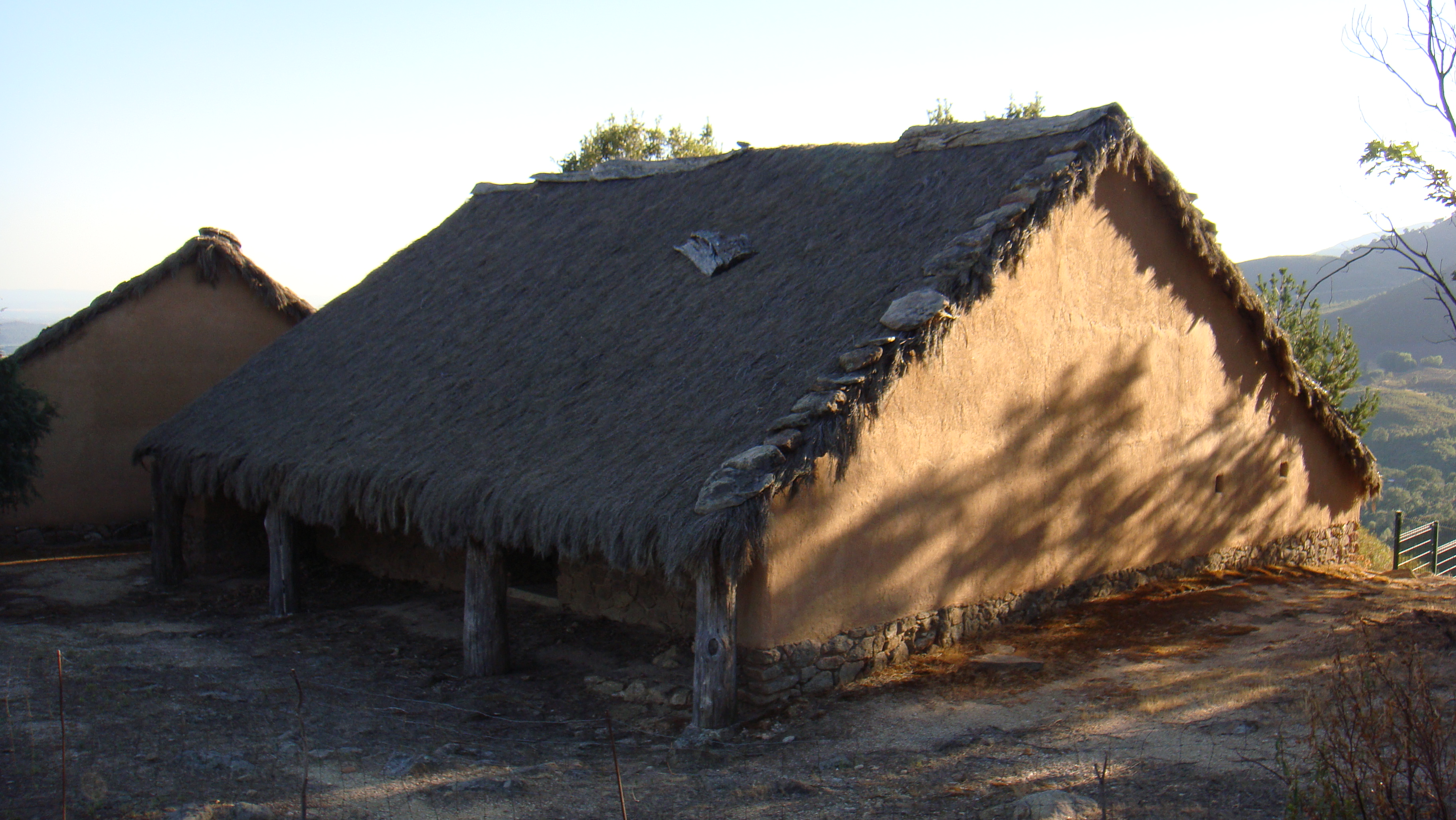 Castro de El Raso (El Reillo), Candeleda, Ávila (España)